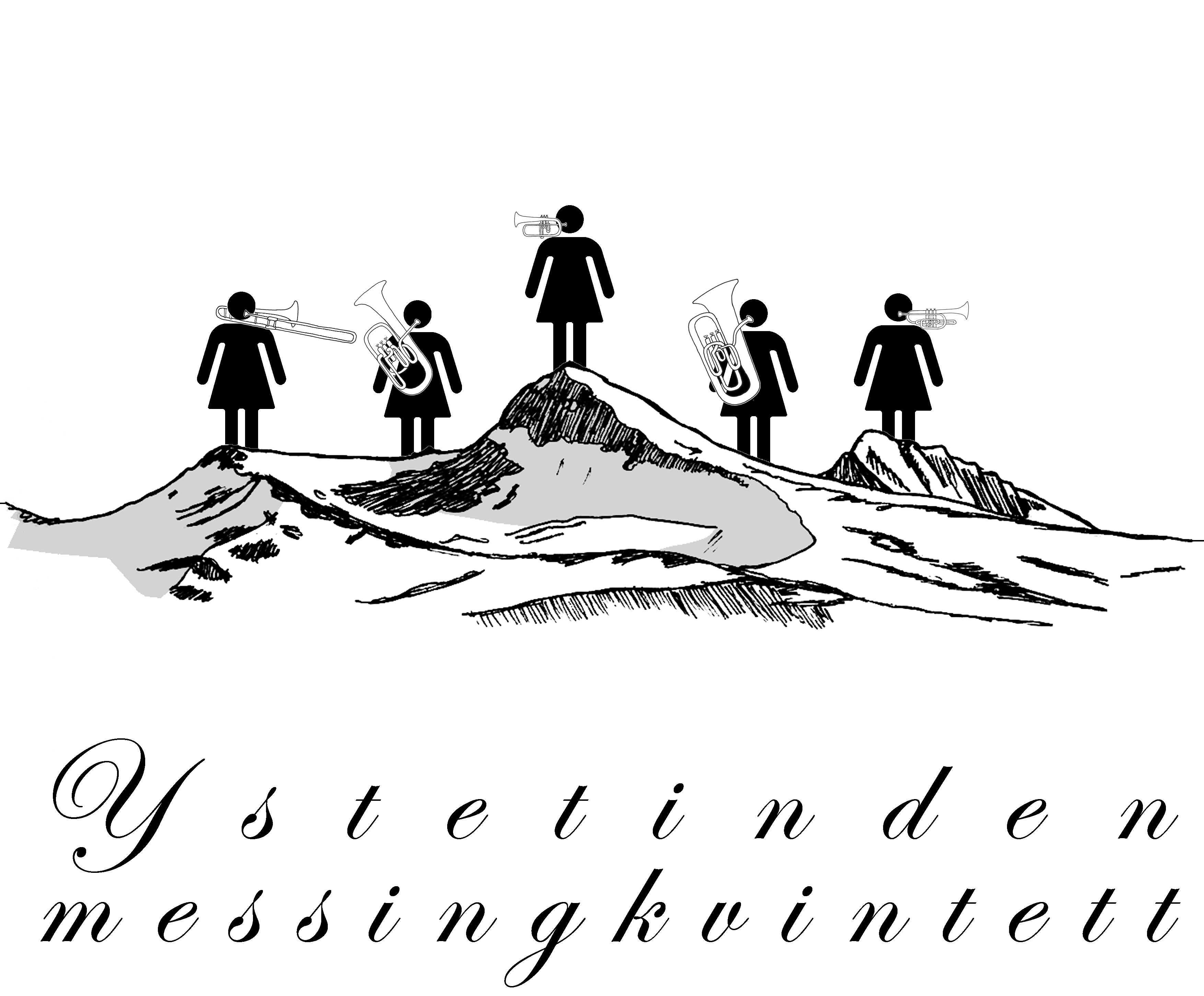 Logo teikna av André M. Reite